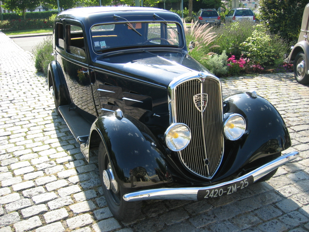 Peugeot 401 - Musée Peugeot Sochaux